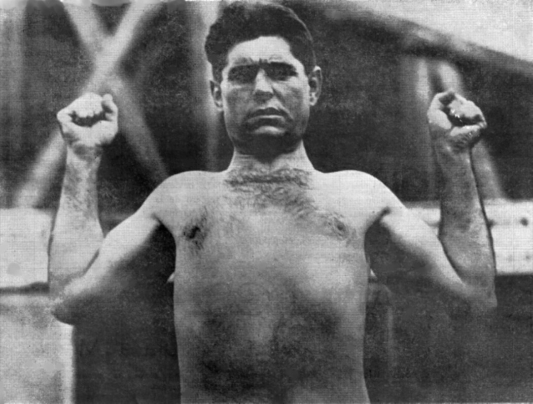 Luis Angel Firpo